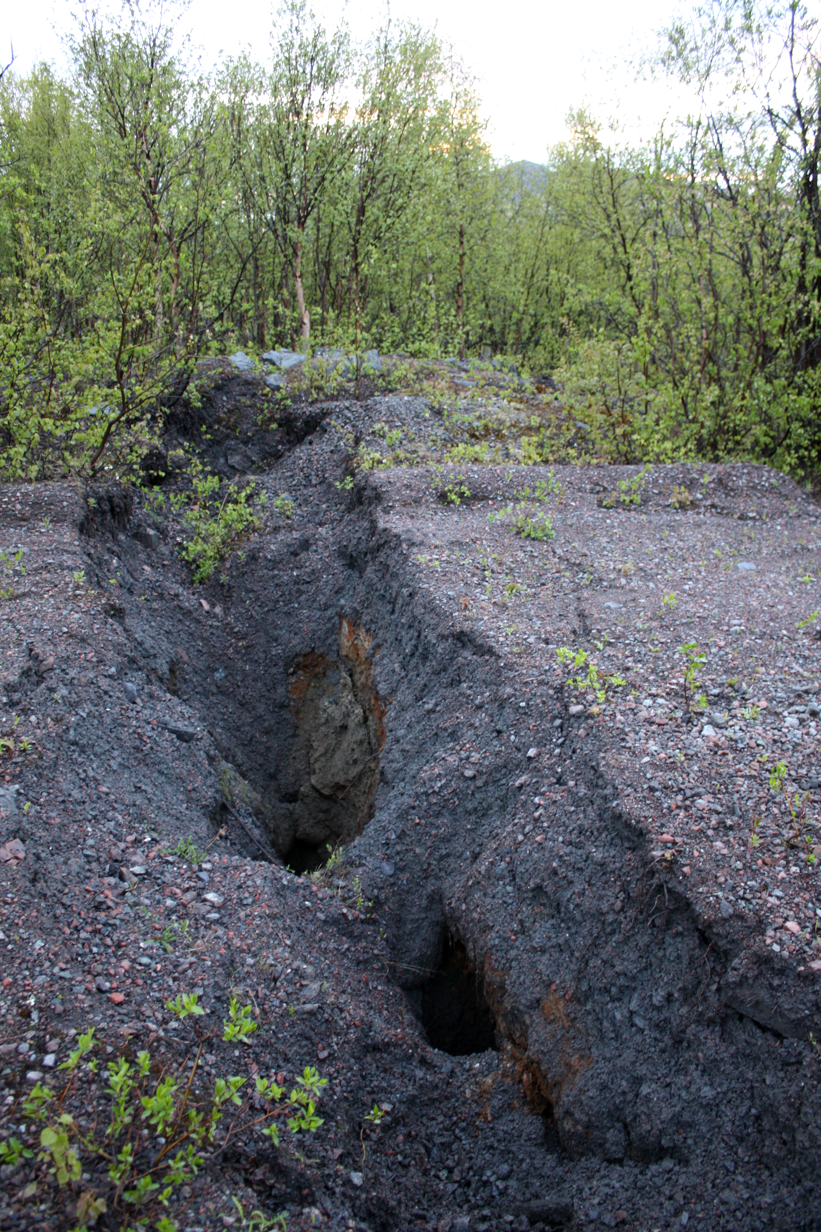 Markdeformation tvärs över grusväg i gamla stadsdelen Ön i Kiruna. I bakgrunden kan man skymta Luossavaaras topp.